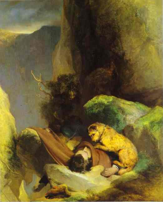 Edwin Landseer - Attachment